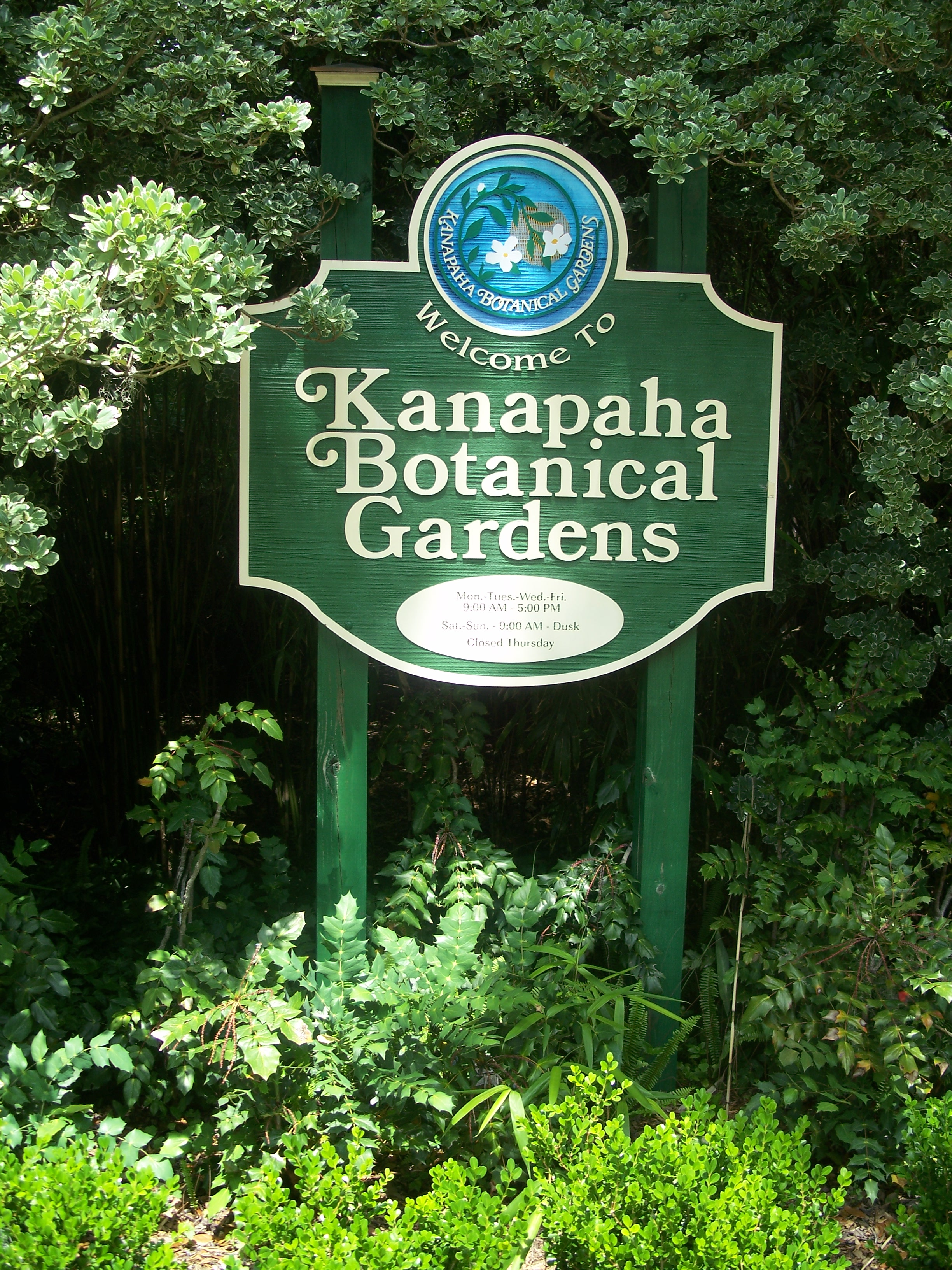 Gainesville, Florida: Kanapaha Botanical Gardens: Sign